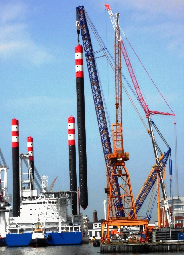 Einbau der Hubbeien auf der LLoydwerft